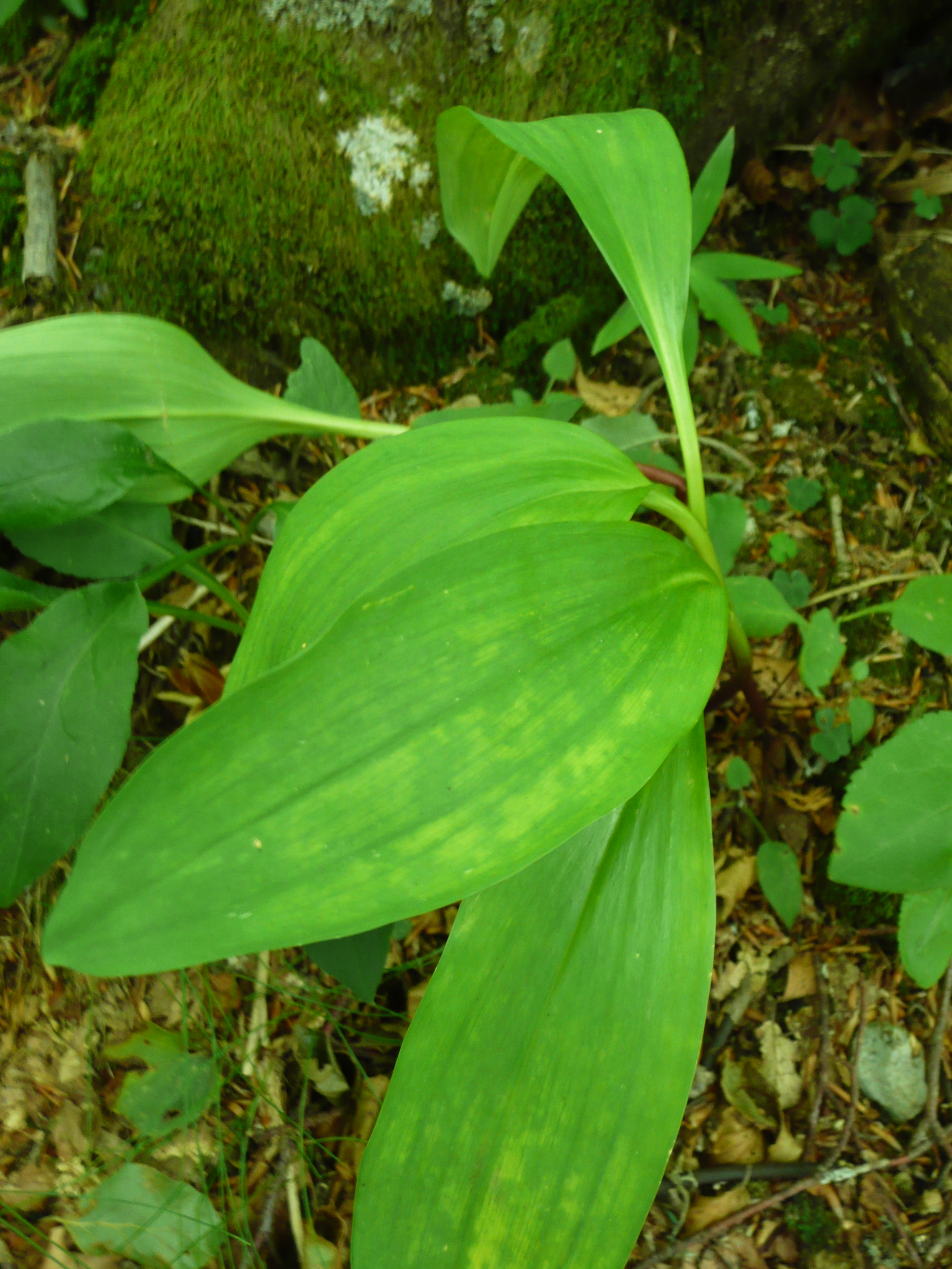 Ail de la Sainte-Victoire (Allium victorialis) dans la Réserve naturelle de la vallée de Chaudefour. Plante identifiée par le Conservateur de la réserve, Eric Vallet, lors d'une visite organisée d'une journée dans la reserve. Map: 45° 32' 11" N 02° 51' 10" E